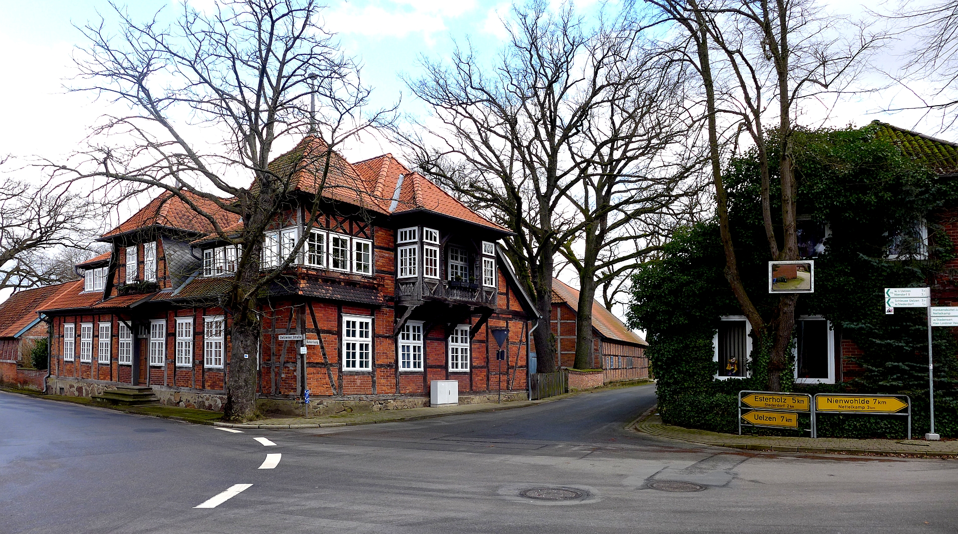 Architektonisch bemerkenswertes Anwesen im Fachwerkstil an der Straße Katerburg, Wrestedt.